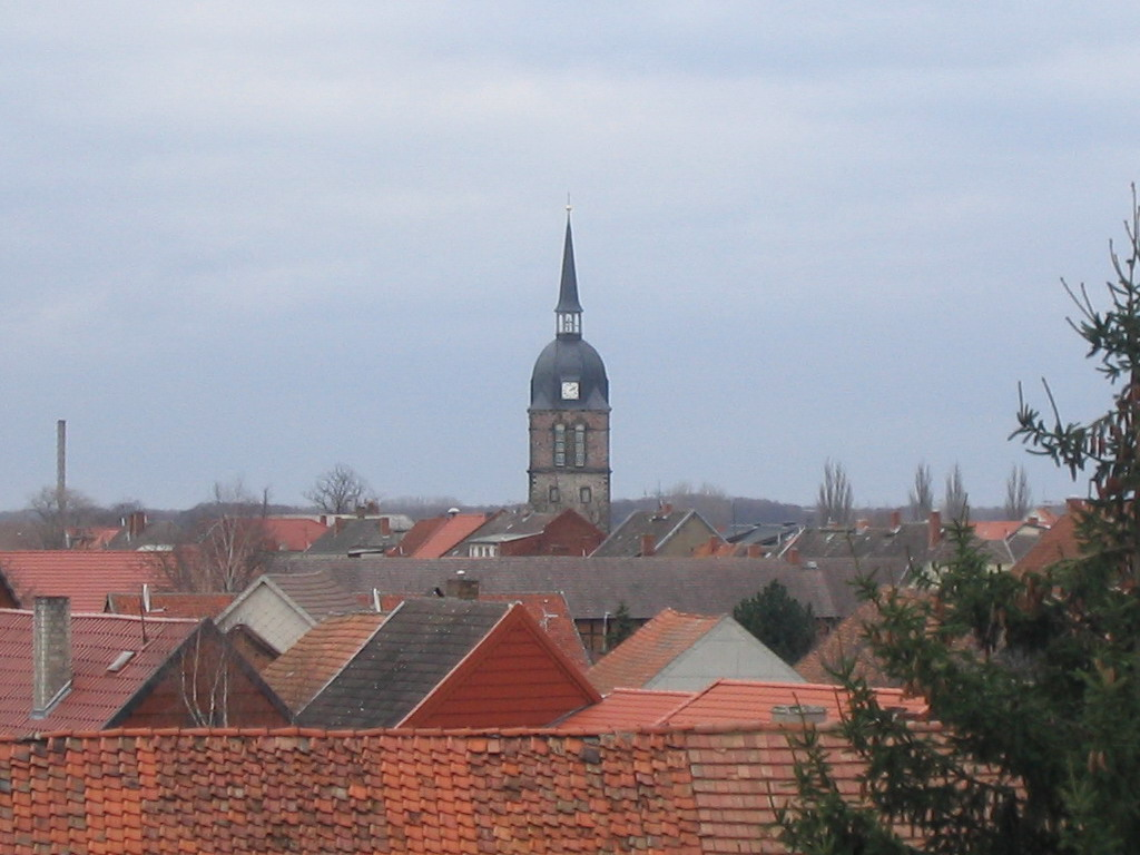 Blick über die Dächer von Calvörde, Germany. Bild aufgenommen am 13.01.2007 durch Geisterbob